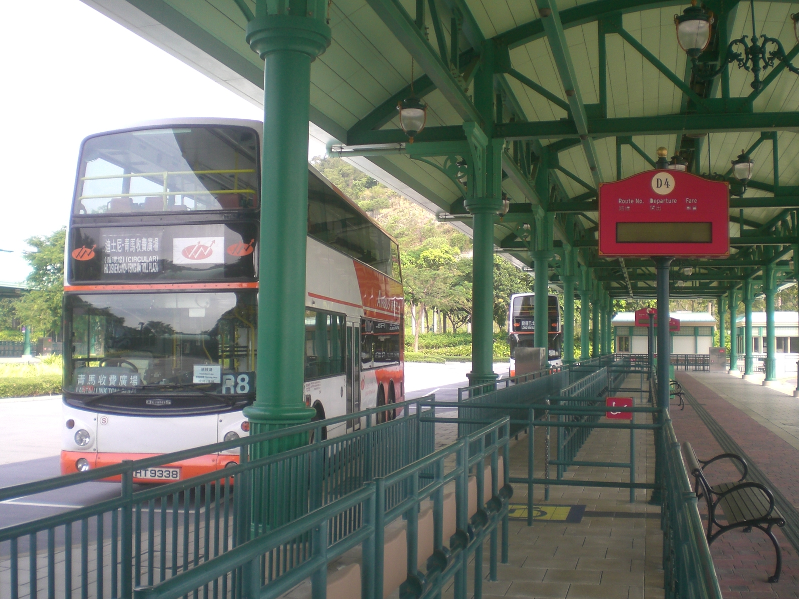 香港迪士尼樂園度假區公共交通交匯處，龍運巴士車站